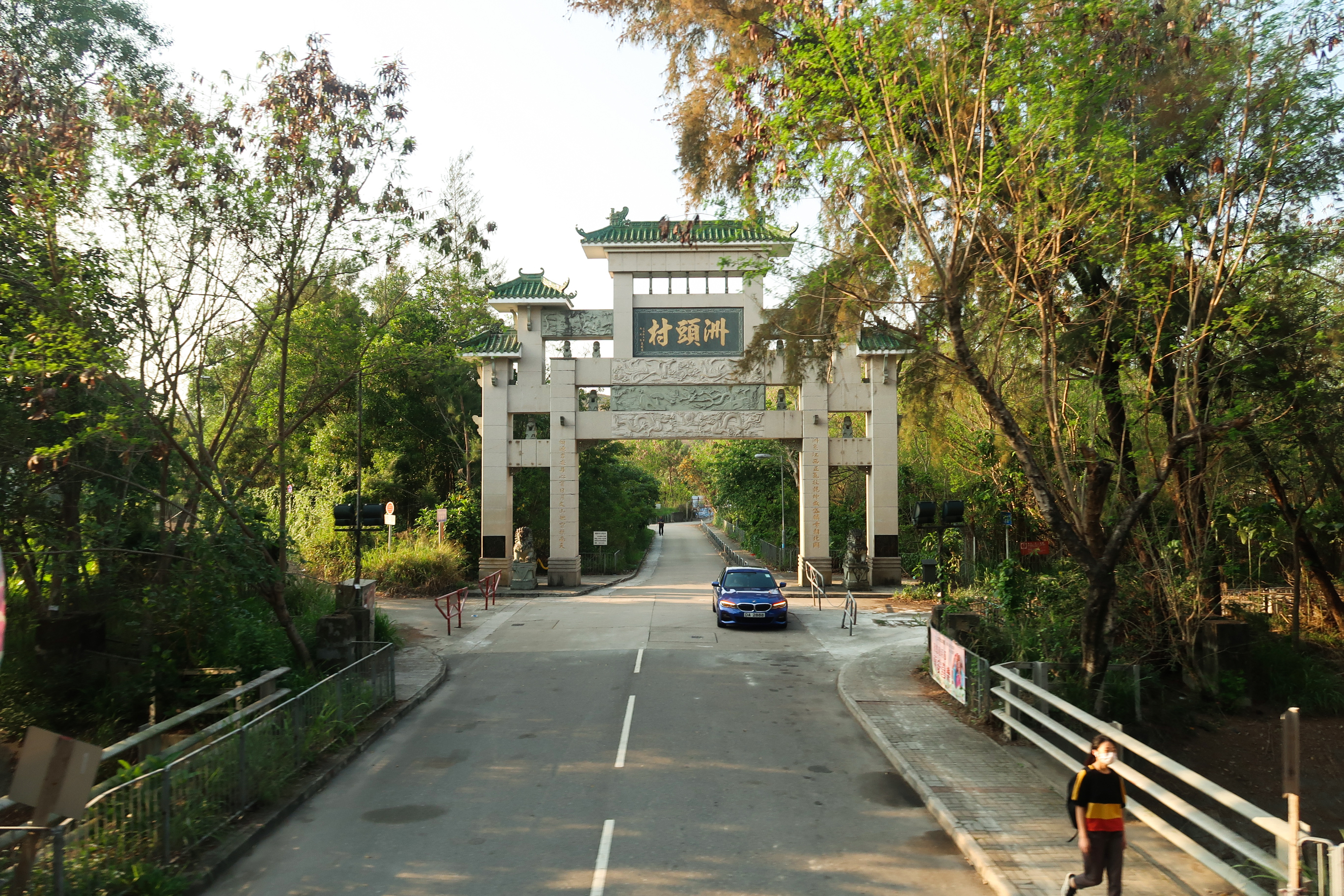 Chau Tau Tsuen Archway